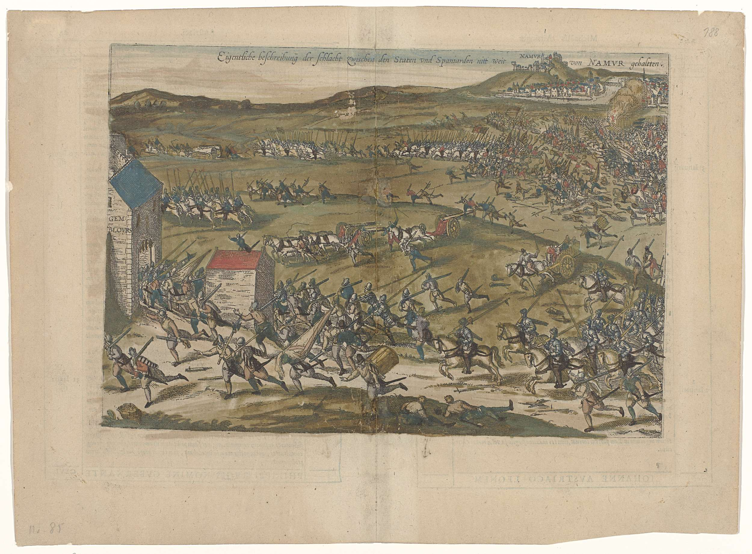 Batalla de gembloux